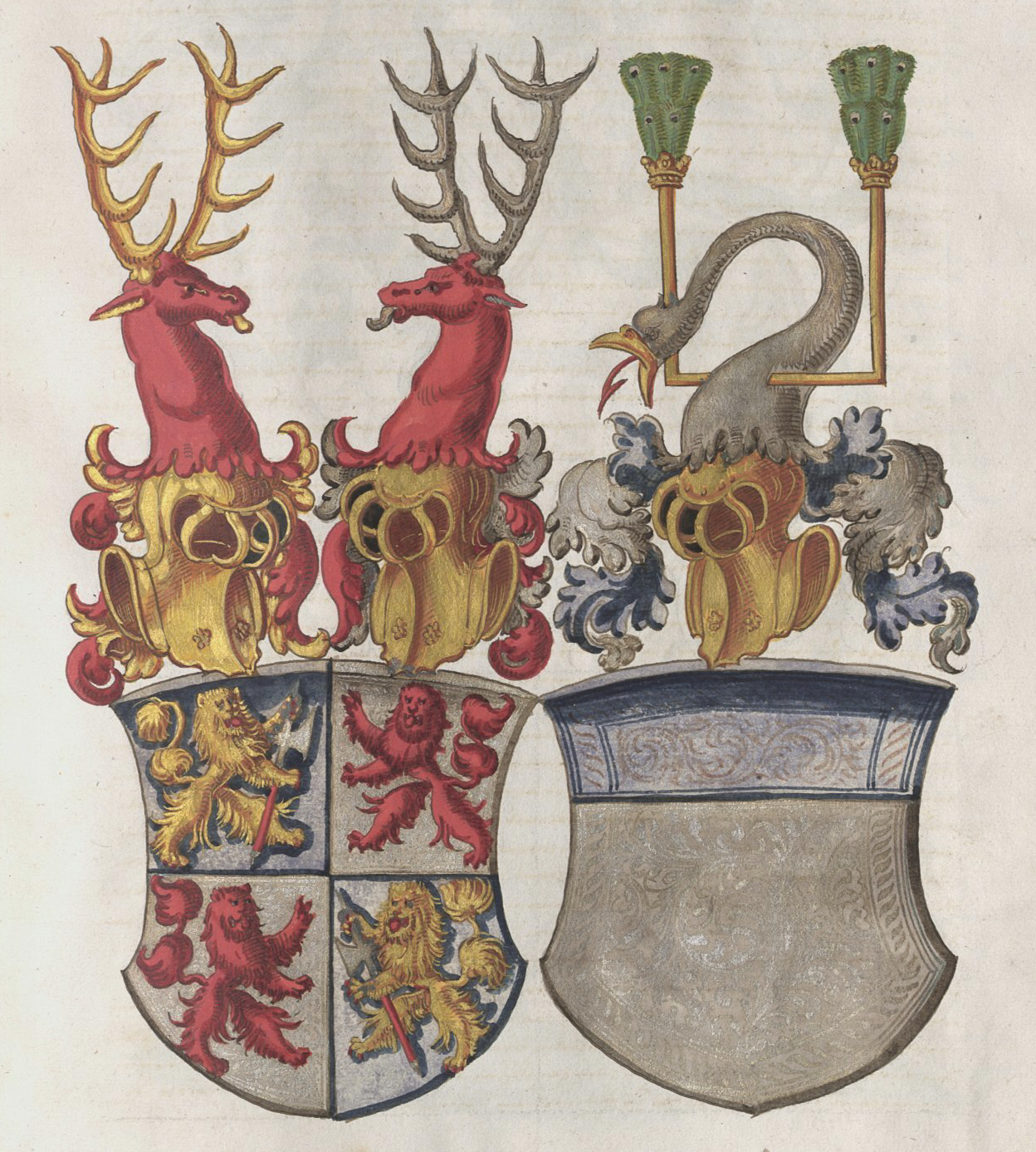 Wappen aus der Zimmerischen Chronik, Handschrift B, Württembergische Landesbibliothek Stuttgart, Cod. Don. 580a, S. 611, Allianzwappen Zimmern / Lupfen